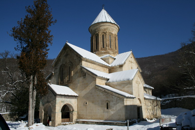 ქვათახევის სამონასტრო კომპლექსი, თბილისიდან 55 კმ-ში, კასპის რაიონში მდებარეობს. ტაძარი XII საუკუნისაა, და პლატონ იოსელიანი მის აღმშენებლად დავით აღმაშენელს მიიჩნევს და აგების წლადაც 1126 წელს ასახელებს, თუმცა სხვა წყაროებში, ტაძრის მშენებლობა თამარის სახელს უკავშირდება. გადმოცემით, ტაძრის საძირკველში ღვთისმშობლის სამოსლის მცირე ნაწილია ჩატანებული და ტაძარიც მის სახელს ატარებს. ტაძარში დაცულია სიწმინდეები: წმინდა იოანე ნათლისმცემლის წმინდა ნაწილი და ღვთისმშობლის მიძინების სასწაულთმოქმედი ხატი. ქვათახევი ქართლის უმთავრეს მონასტრად მიიჩნეოდა და მას დიდებულები ყოველთვის მფარველობდნენ. დაცულია მეფე ლაშა-გიორგის შეწირულობის სიგელიც ქვათახევისადმი... სავარაუდოდ 1389 წელს თემურ-ლენგს სასტიკად დაურბევია ქვათახევის მონასტერი, იქ მყოფთათვის ქრისტეს უარყოფა მოუთხოვია. მონასტრის ბინადარნი კი უდრეკად ყოფილან. შეუკრებია თემურ-ლენგს მონაზვნები, ბერები, მთელი სამღვდელოება, რომელთა რაოდენობა ერთ დიდი სოფელს აღემატებოდა, გამოკეტა ისინი ტაძარში და ცეცხლს მისცა იქაურობა. ტაძრის იატაკზე ეხლაც არისო დამწვარი სხეულების კვალი... აოხრებული ტაძარი მოგვიანებით ალექსანდრე დიდმა აღადგინა და მას შემდეგ, 1796 წლამდე მონასტერი იმდენად წმინდად მიიჩნეოდა, რომ იქ ქალს ფეხი არ დაუდგამს...